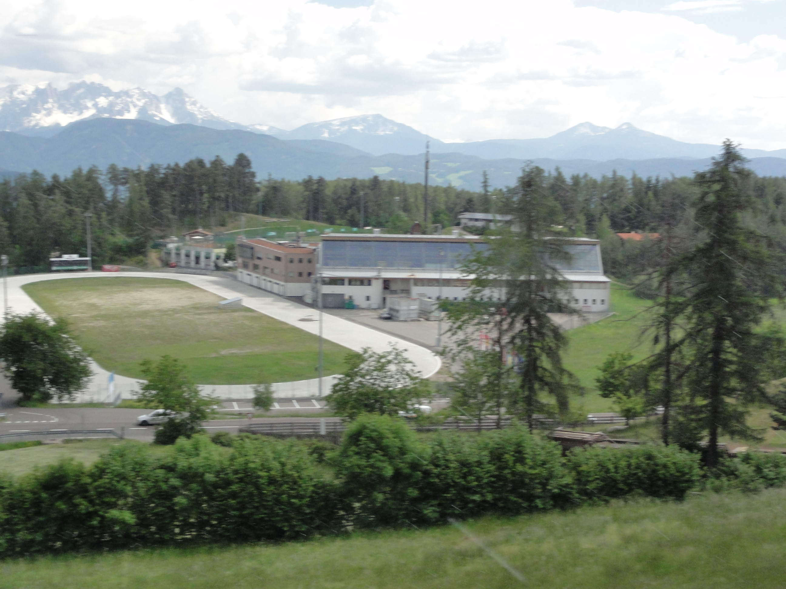 Klobenstein, Gemeinde Ritten, Autonome Provinz Bozen, Autonome Region Trentino Südtirol South Tyrol, Italy